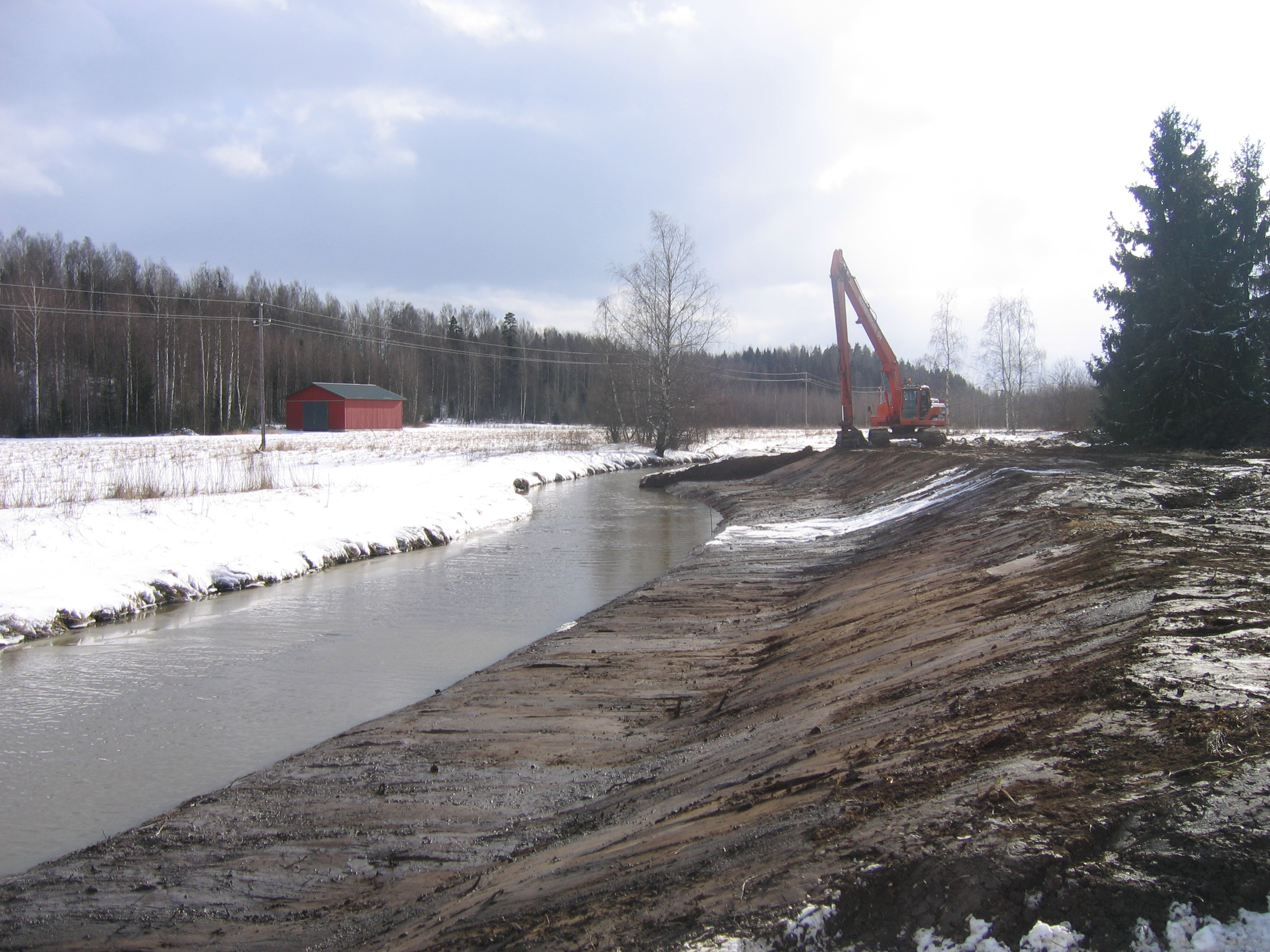 Tuusulanjoen kunnostus